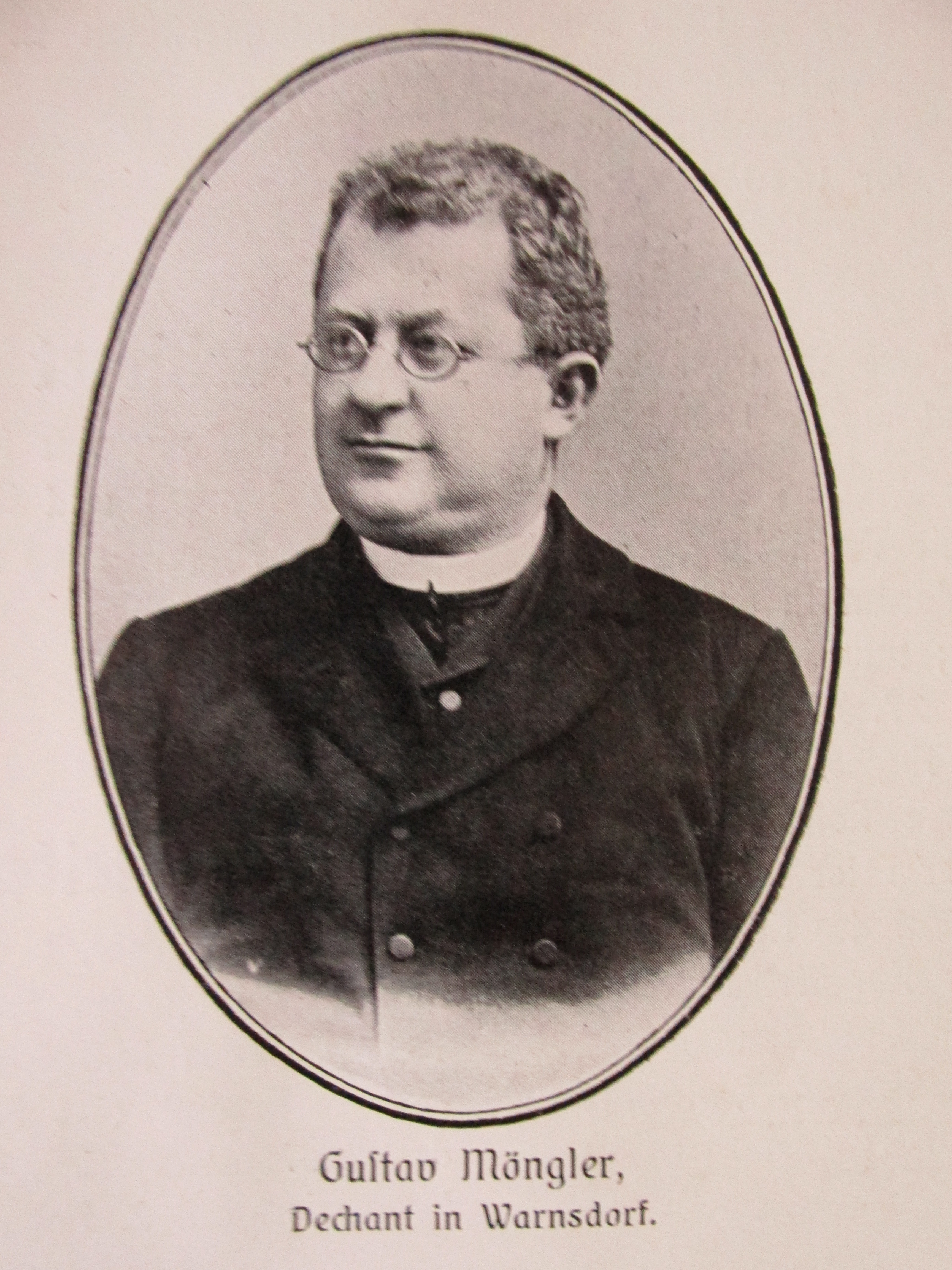 P. Gustav Josef Möngler; * 26. 07. 1866 v 6 hodin ráno Loučné u Jiříkova, čp. 26; syn: Gustav Möngler, syn Carla Mönglera a Rosalie roz. Wenzel; Magdalena, dcera Josefa Hase a Magdaleny roz. Herbrich; gymnaziální studia na Gymnáziu v Bohosudově; filosoficko - teologická studia v Litoměřicích; děkan ve Varnsdorfu